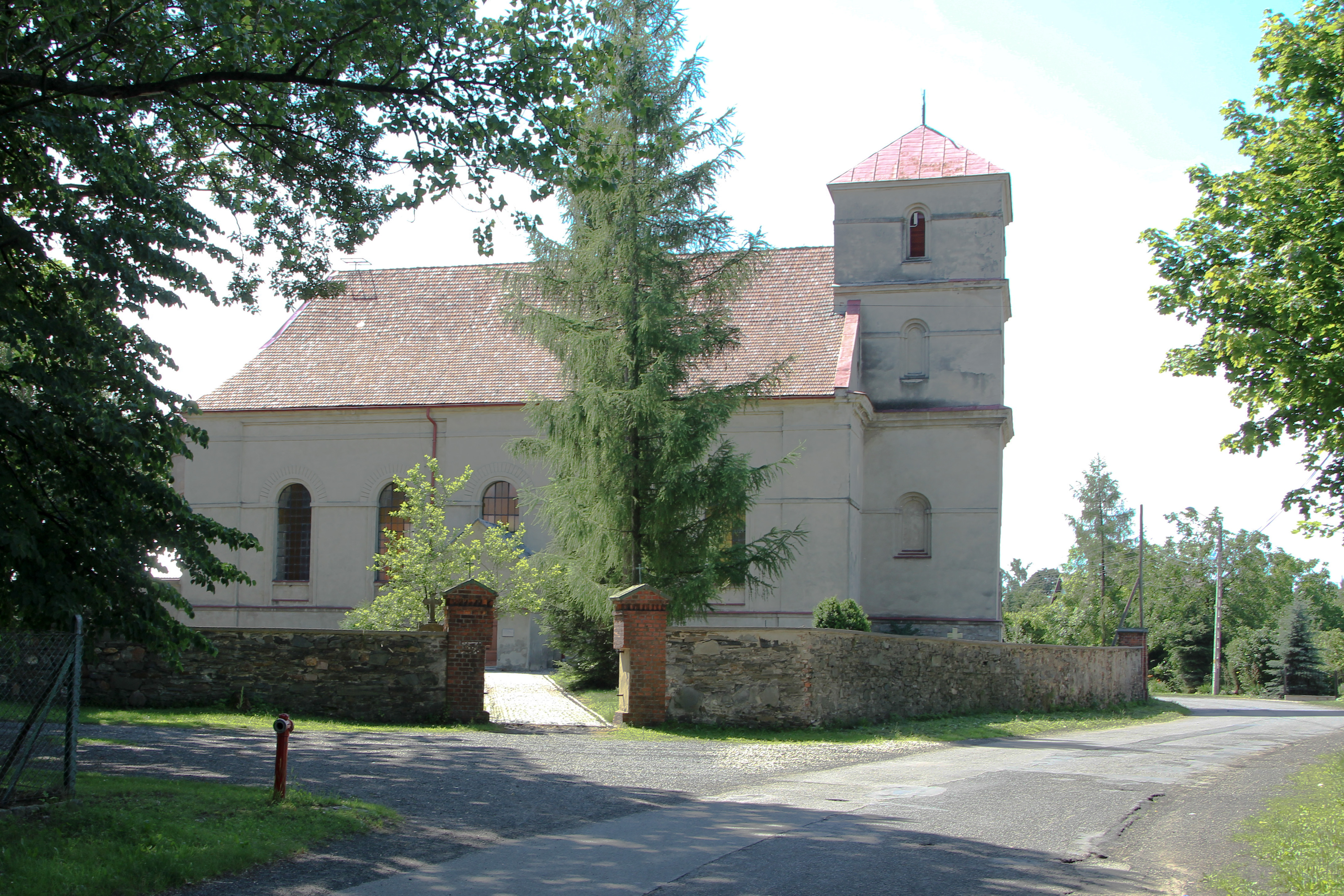 Nowy Las 35 - rzymskokatolicki kościół parafialny p.w. św. Jadwigi Śląskiej, 1823, 1949.